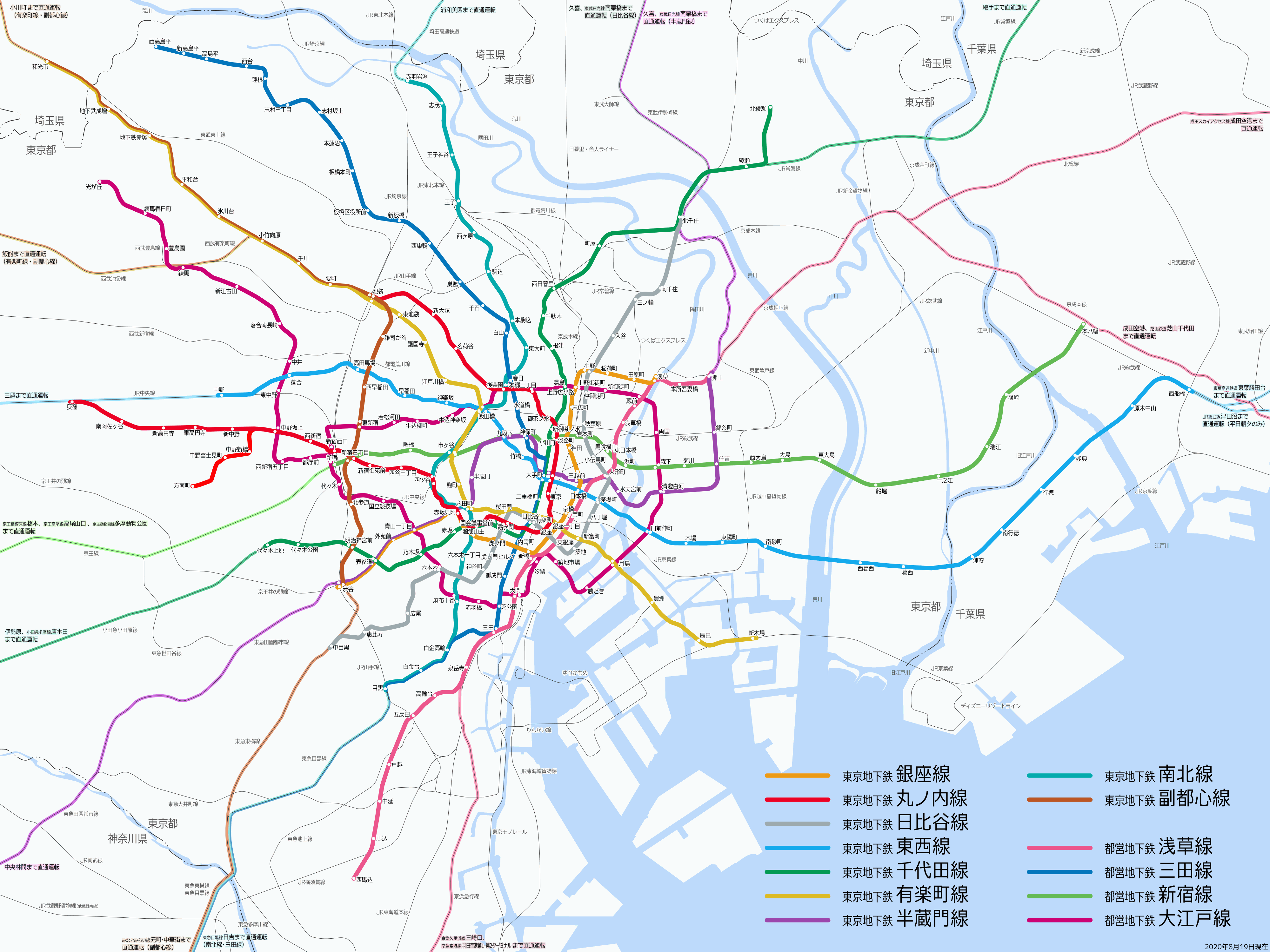 東京地下鉄・都営地下鉄の路線図（2020年8月19日現在）